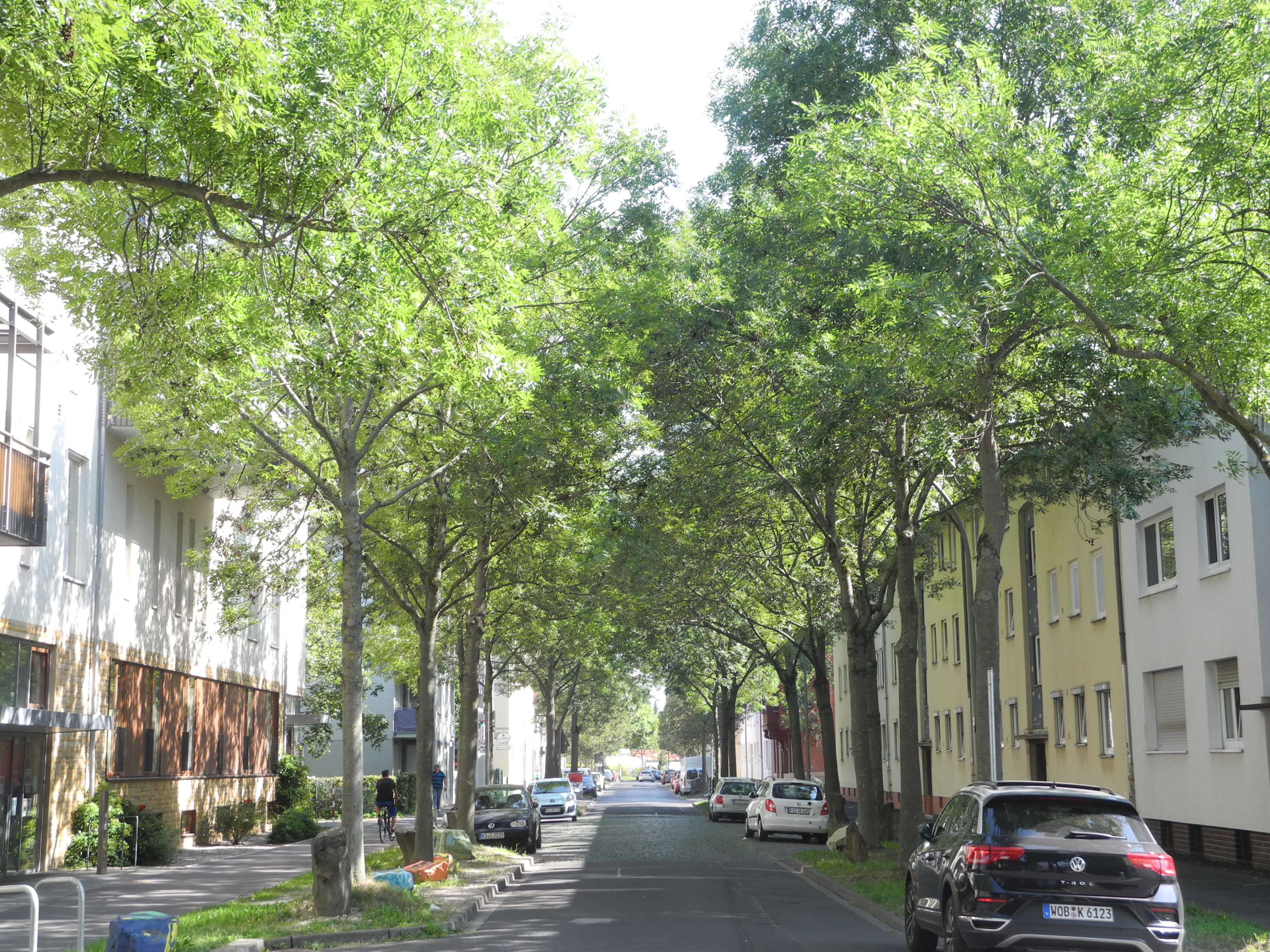 7000 Eichen – Stadtverwaldung statt Stadtverwaltung, eine soziale Plastik von Joseph Beuys, gestartet 1982 auf der documenta 7 in Kassel, Hessen, Deutschland. Standort: Hafenstraße Art: Gemeine Esche (Fraxinus excelsior 'Westhofs Glorie' ) Pflanzjahr: ab 1986 Blick nach Nordosten.